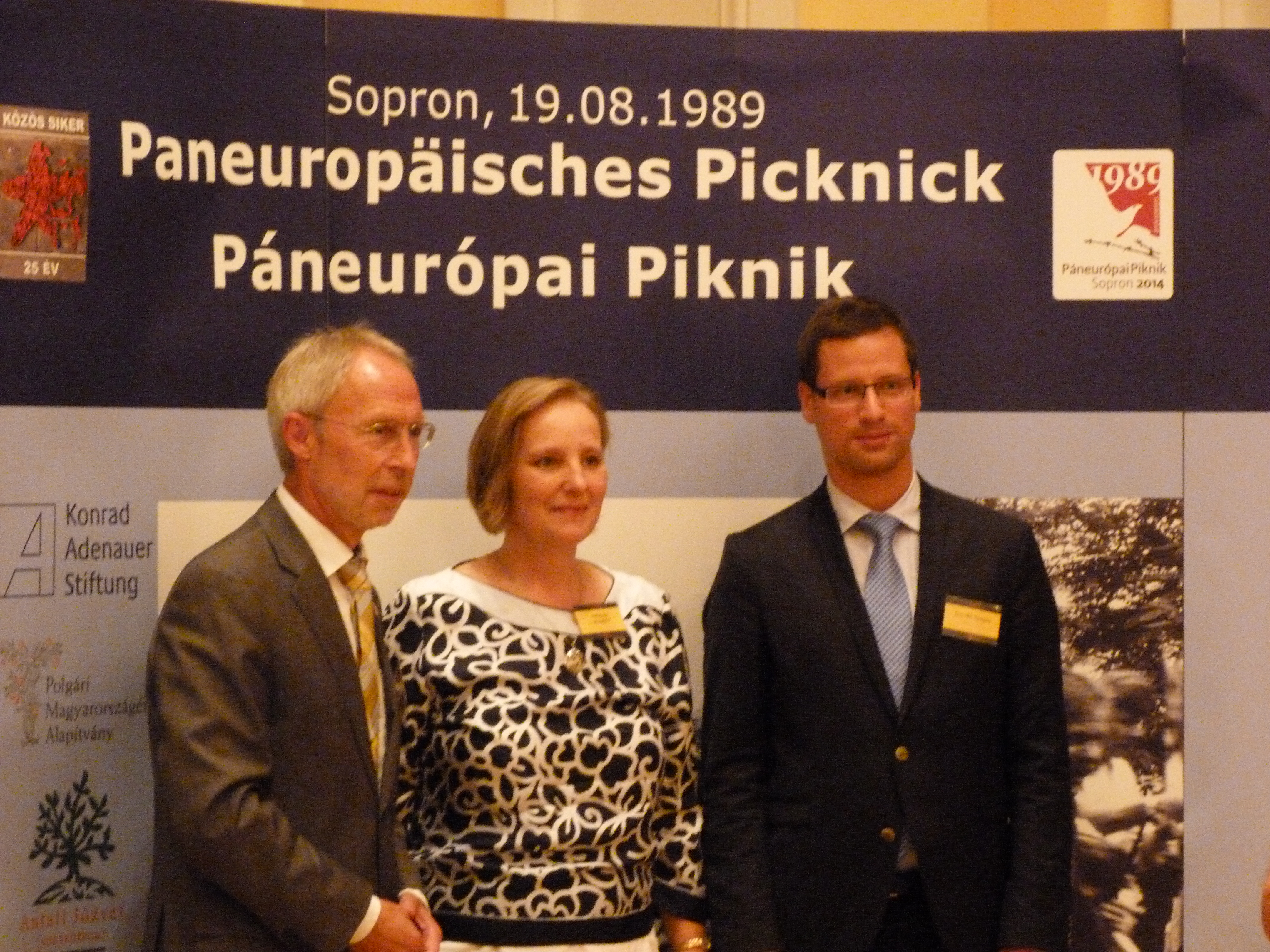 A felvétel 2014. augusztus 18-án, hétfőn készült Sopronban. Kapu a szabad Európa felé. 25 éves a Páneurópai Piknik. Konferenciát szervezett a Polgári Magyarországért Alapítvány a Konrad Adenauer Alapítvánnyal, az Antall József Tudásközponttal, a Páneurópai Piknik '89 Alapítvánnyal, Sopron Városával.